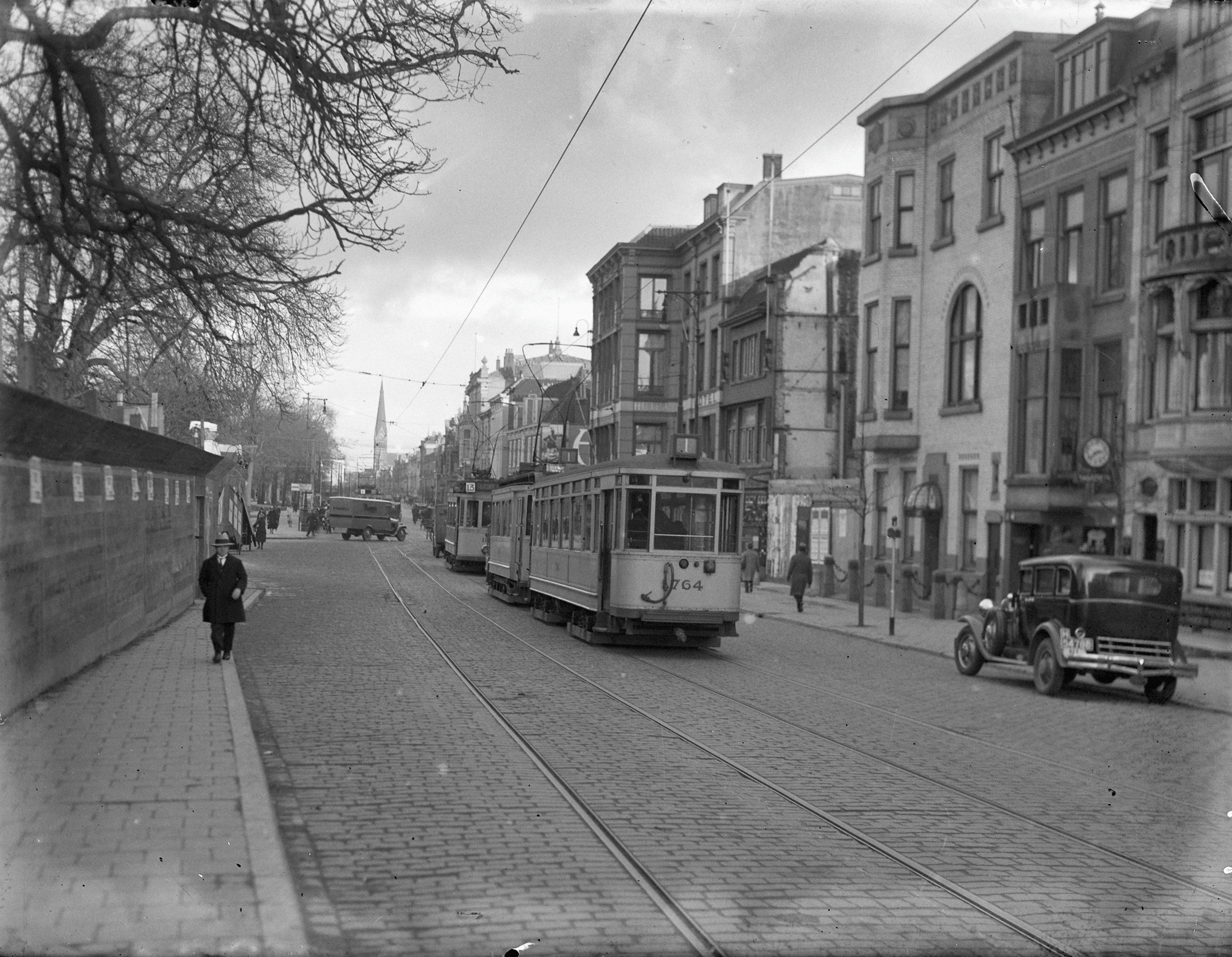 stadsbeeld This is a possible Rijksmonument:Find the monument in the Monuments database:Bezuidenhout in 's-GravenhageAll Rijksmonumenten in 's-GravenhageIs this a Rijksmonument?YesNoMore information about this project and help. More images to work at in Category:Possible Rijksmonumenten.